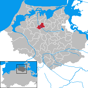 Löbnitz in Mecklenburg-Vorpommern - District Nordvorpommern